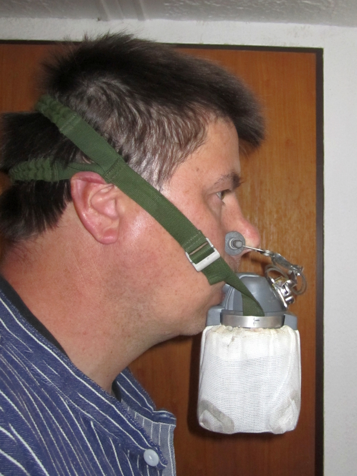 Auer Filterselbstretter W65-2, aufgesetzt